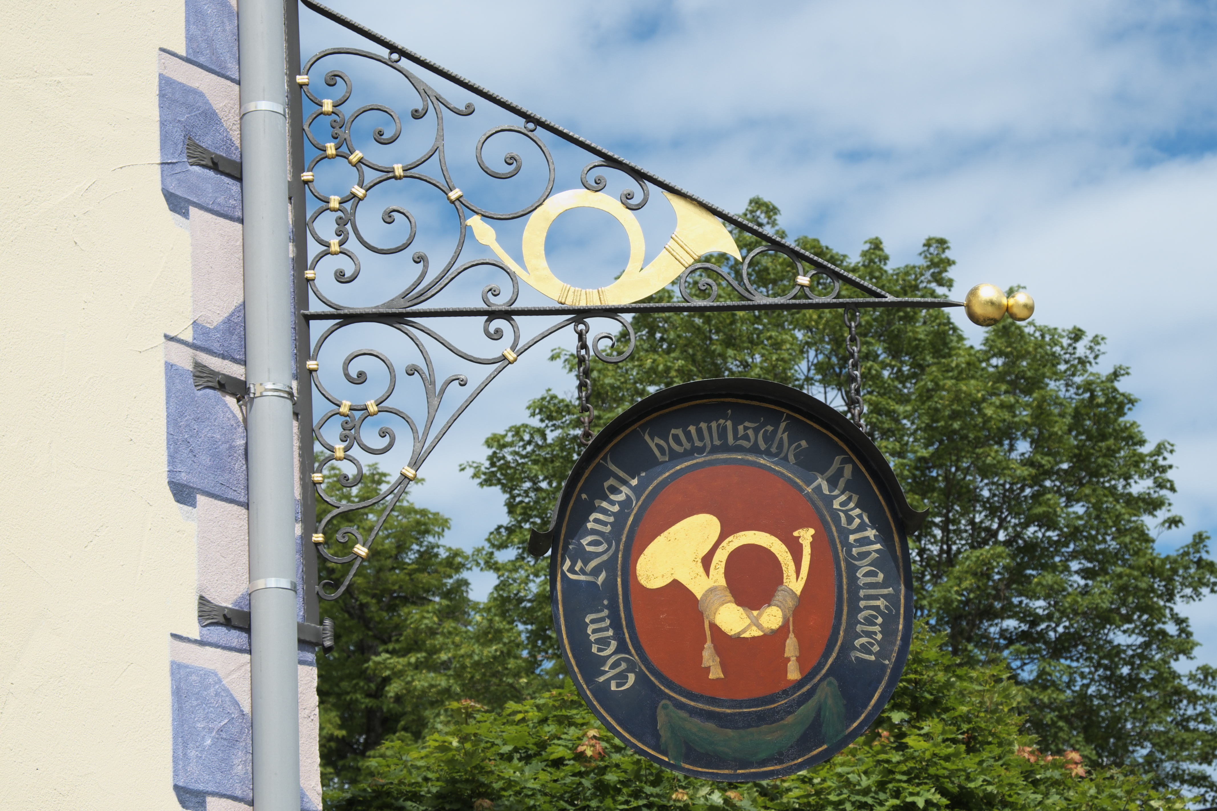 Gasthof Postwirt in der Tegernseer Landstraße 2 in Sauerlach im Landkreis München (Bayern/Deutschland), Wirtshausschild